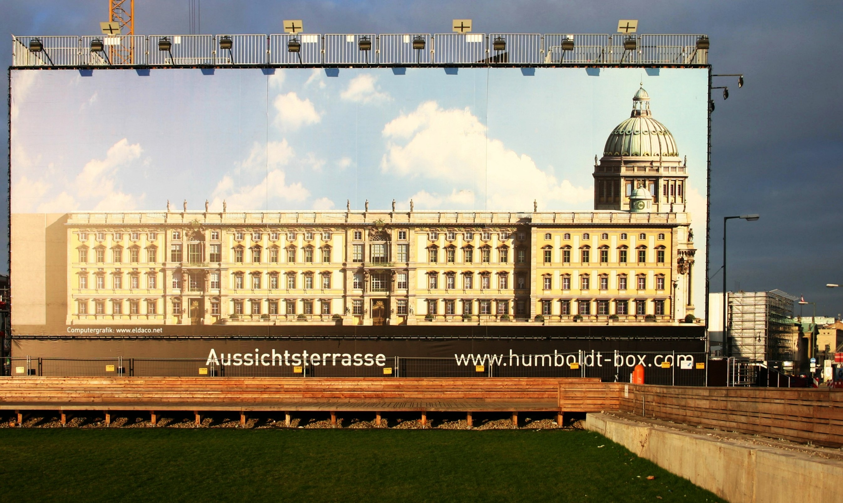 Berliner Stadtschloss als Abbildung auf der Humboldt-Box mit Aussichtsterasse